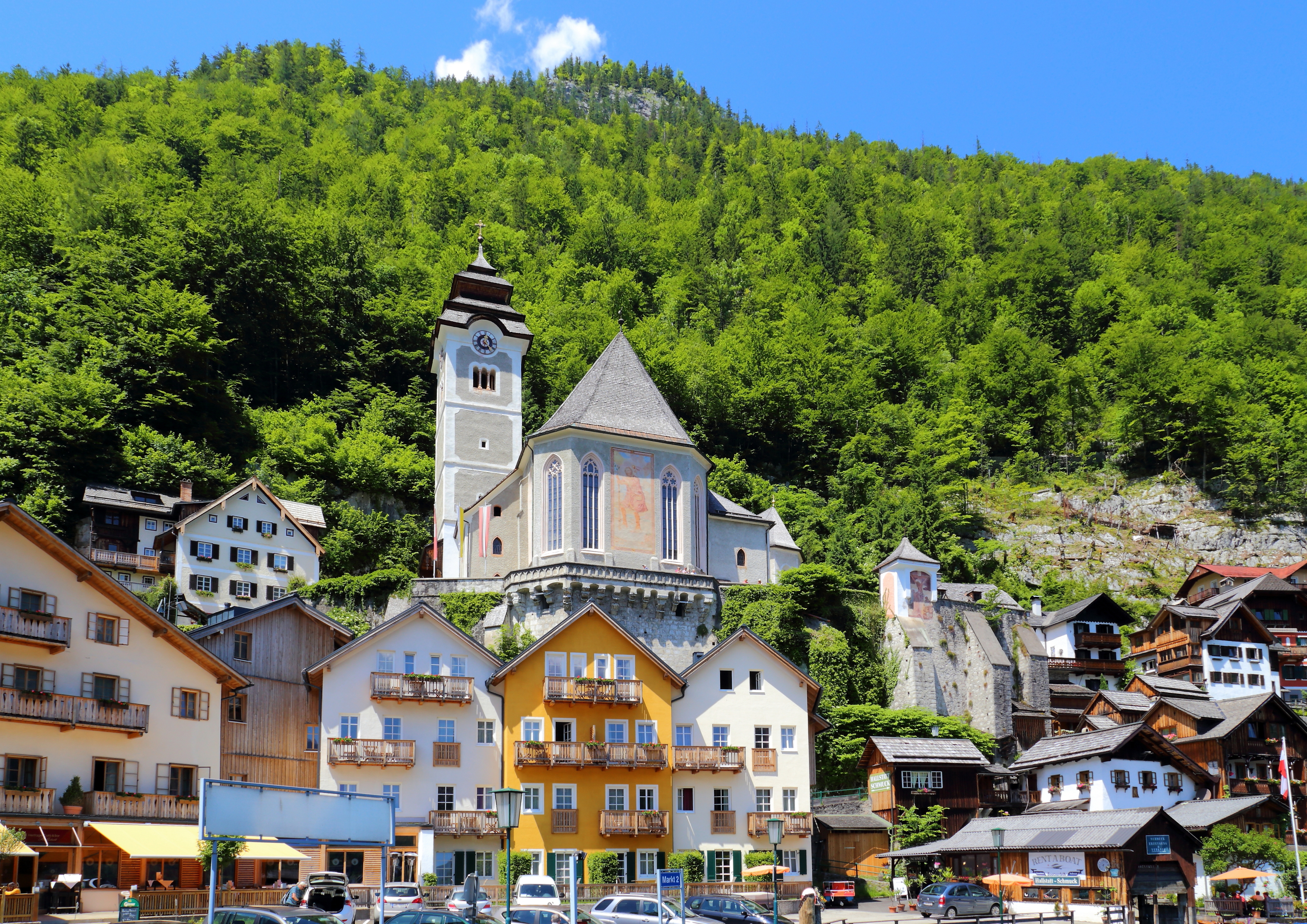 Ostansicht der katholischen Pfarrkirche Mariä Himmelfahrt der oberösterreichischen Marktgemeinde Hallstatt. Eine große weiträumige spätgotische Hallenkirche mit einem zweischiffigen, quadratischen Langhaus und einem Doppelchor.